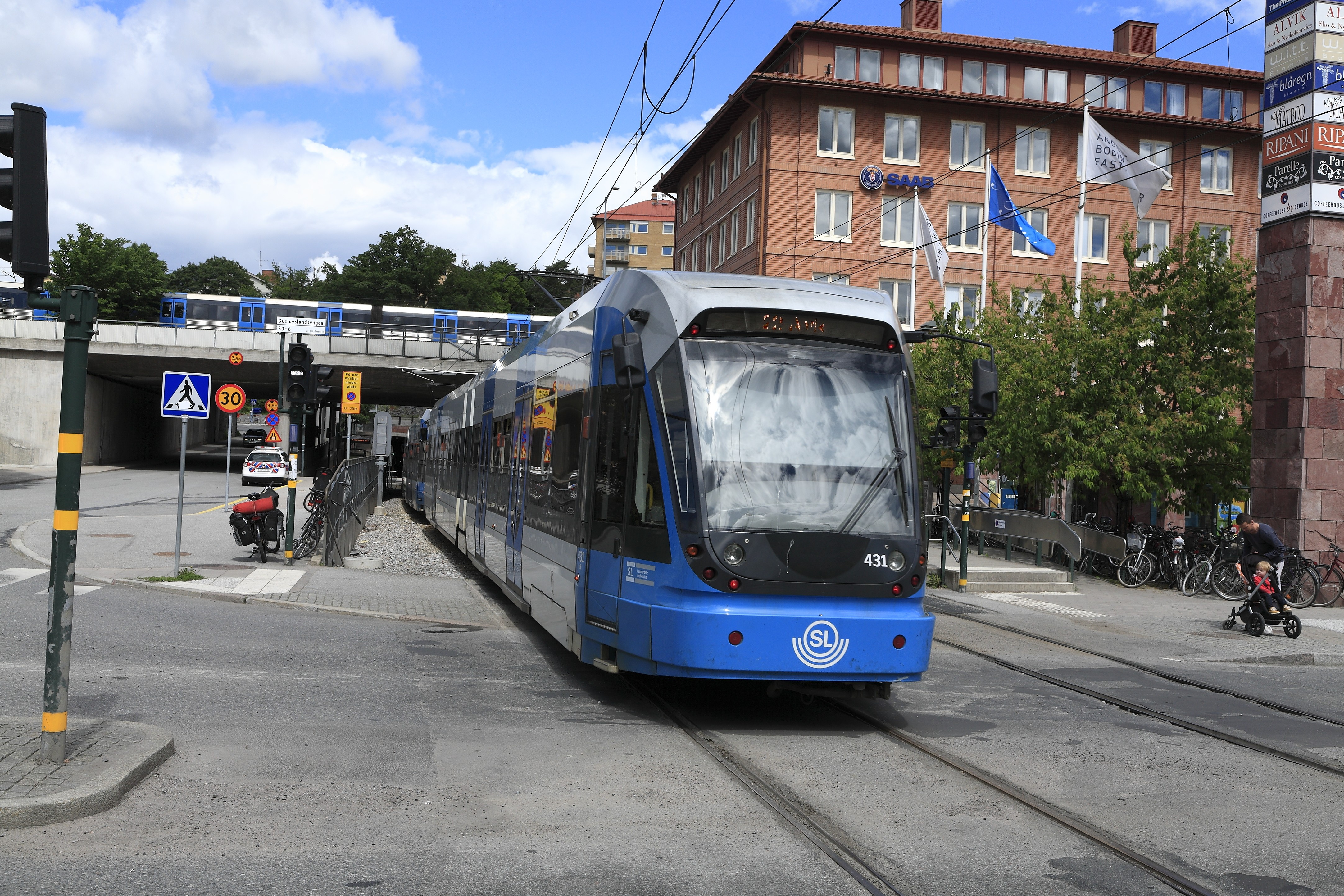 Zug von Sickla udde nach Alvik, Nachschuss. Noch enden die Züge hier, sie kehren im Bw Bromma.